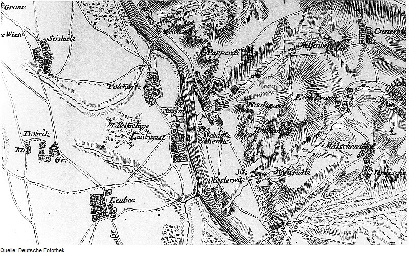 Original image description from the Deutsche Fotothek Dresden-Schönfeld. Ausschnitt aus: Karte von einem Teil des Kurfürstentums Sachsen, Petri, nach 1759 (Sign.: VII 63)